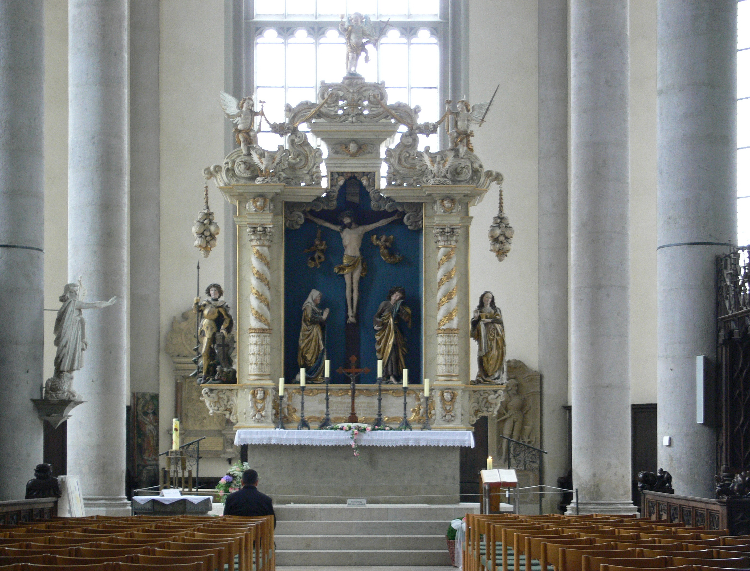 Pfarrkirche St. Georg, Nördlingen Hauptaltar